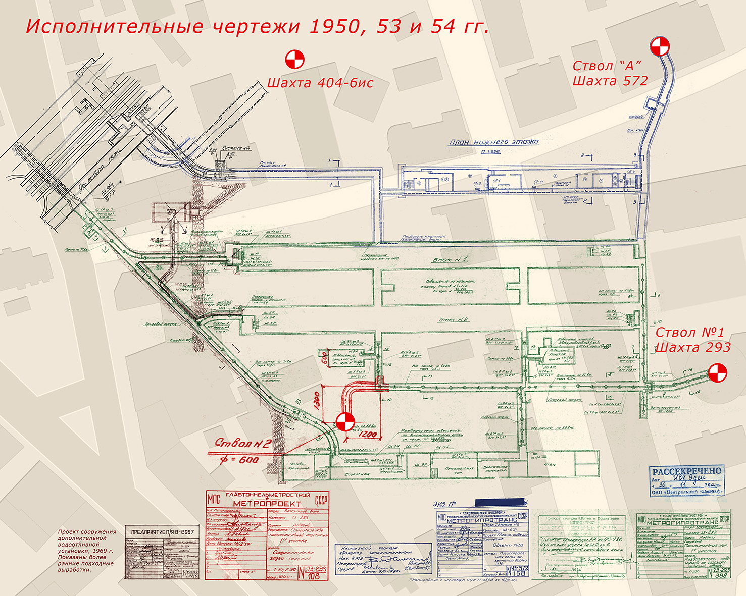 Чертежи ЧЗ-293 и ЧЗ-572 выпущены государственными предприятиями по заданию органов власти СССР более 60 лет назад, рассекречены в установленном порядке. На одном листе объединены данные из четырех чертежей, которые использовались для строительства бункера на Таганской. Интересно, что некоторые из чертежей имеют маскировочный заголовок "Понизительная подстанция первого участка".